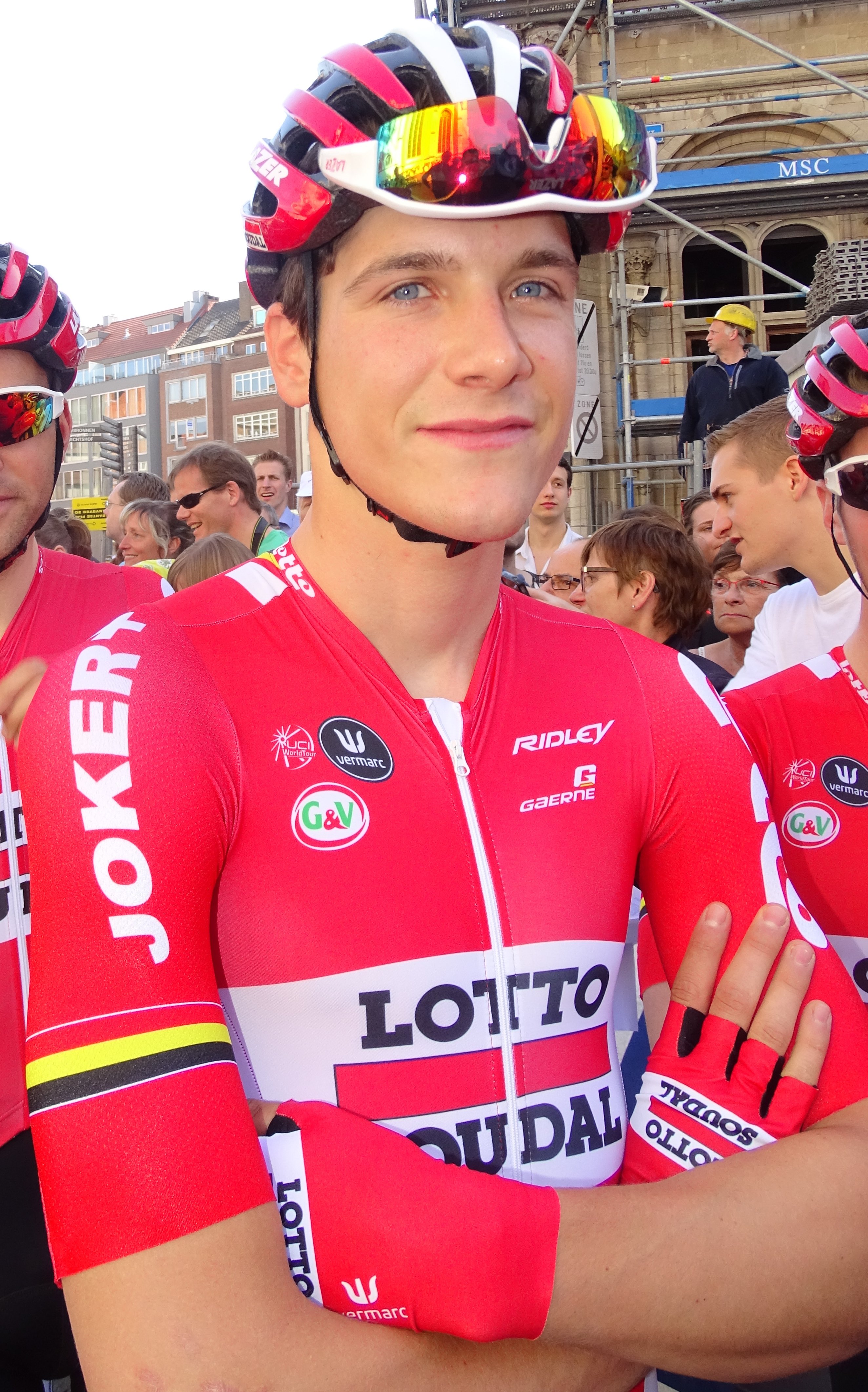 Reportage réalisé le mercredi 15 avril à l'occasion du départ de la Flèche brabançonne 2015 à Louvain, Belgique.